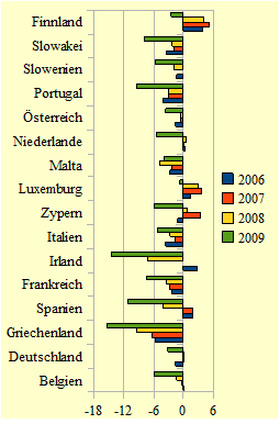 Staatsdefizit im Verhältnis zum BIP in % der Eurozone